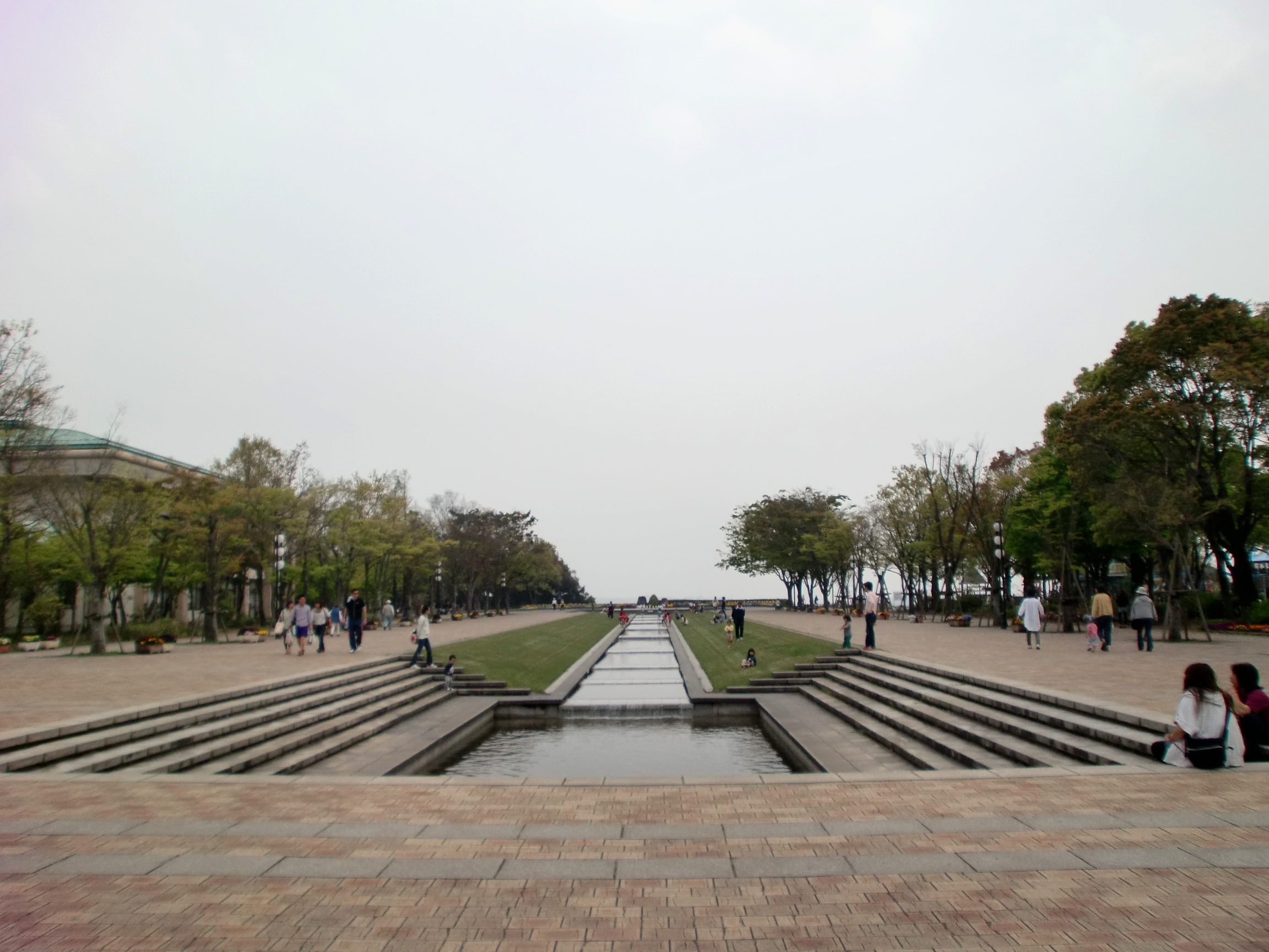 かごしま健康の森公園の噴水。